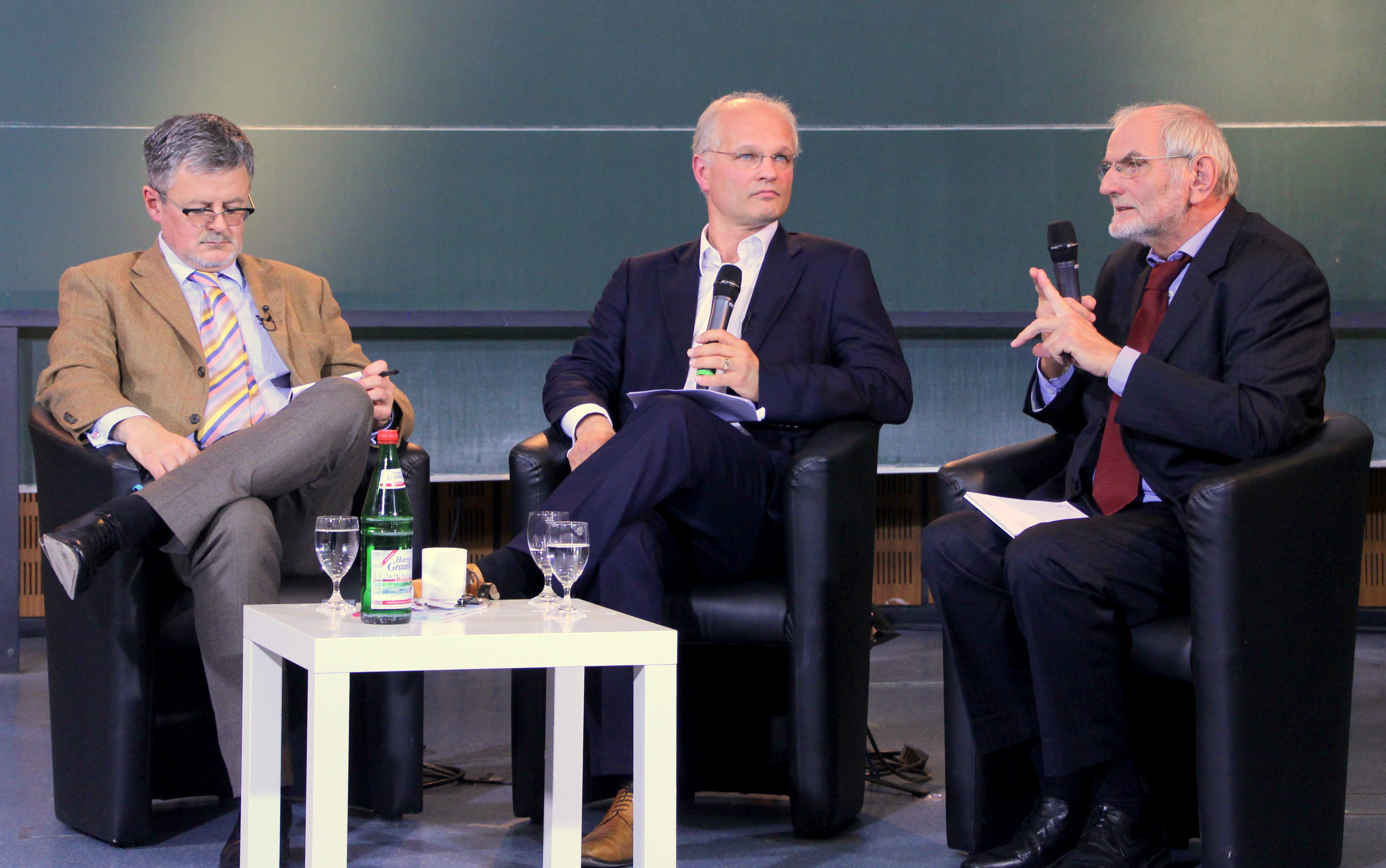 Historikertag 2014 in Göttingen. Das Bild zeigt von links nach rechts: Christopher Clark, Johannes Paulmann, Gerd Krumeich.